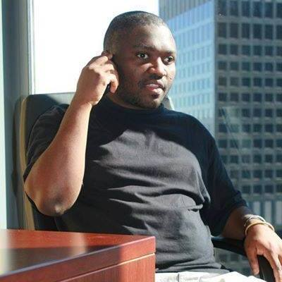 Mason Ewing dans son bureau à Los Angeles